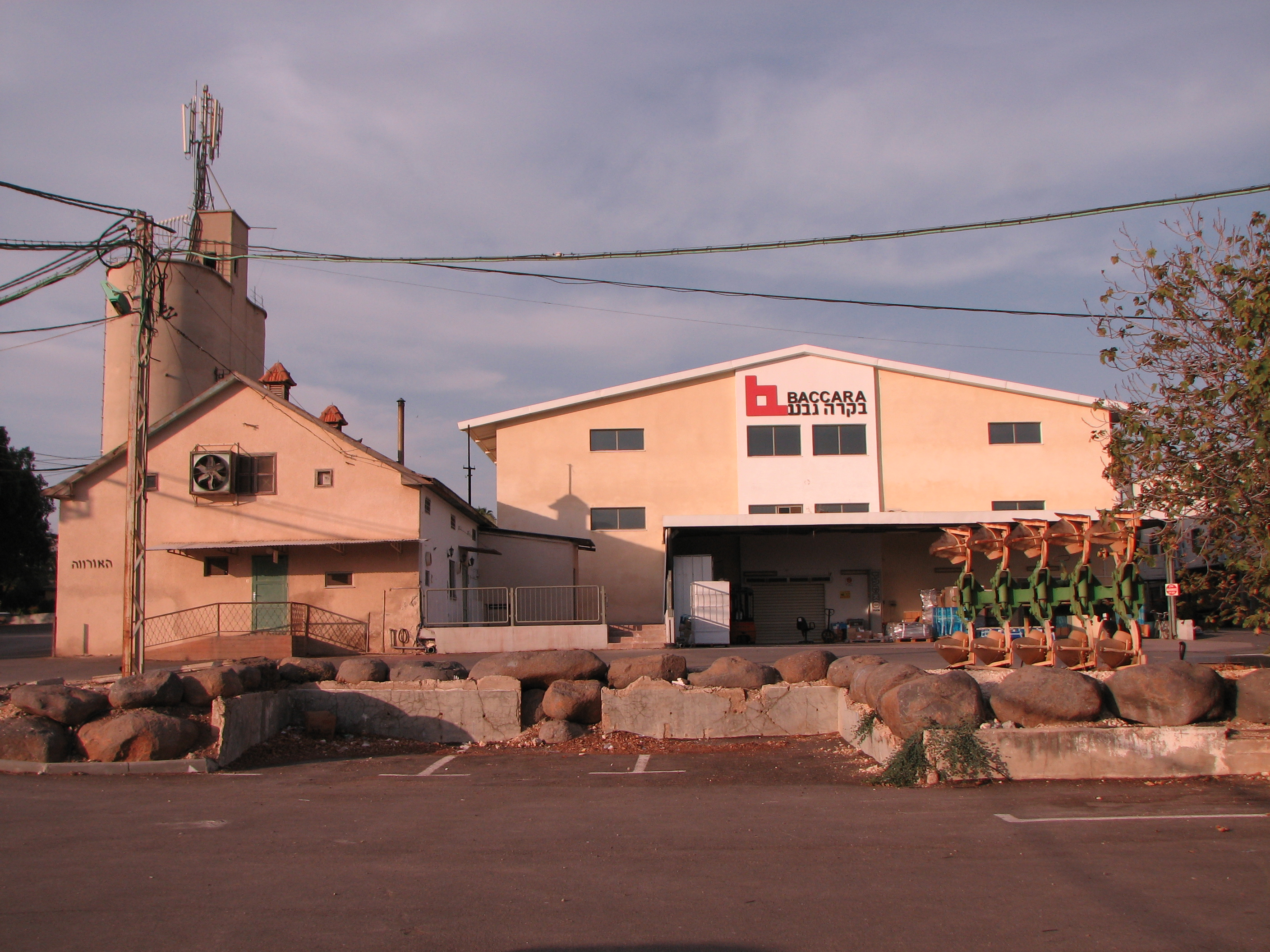 חצר קבוצת גבע